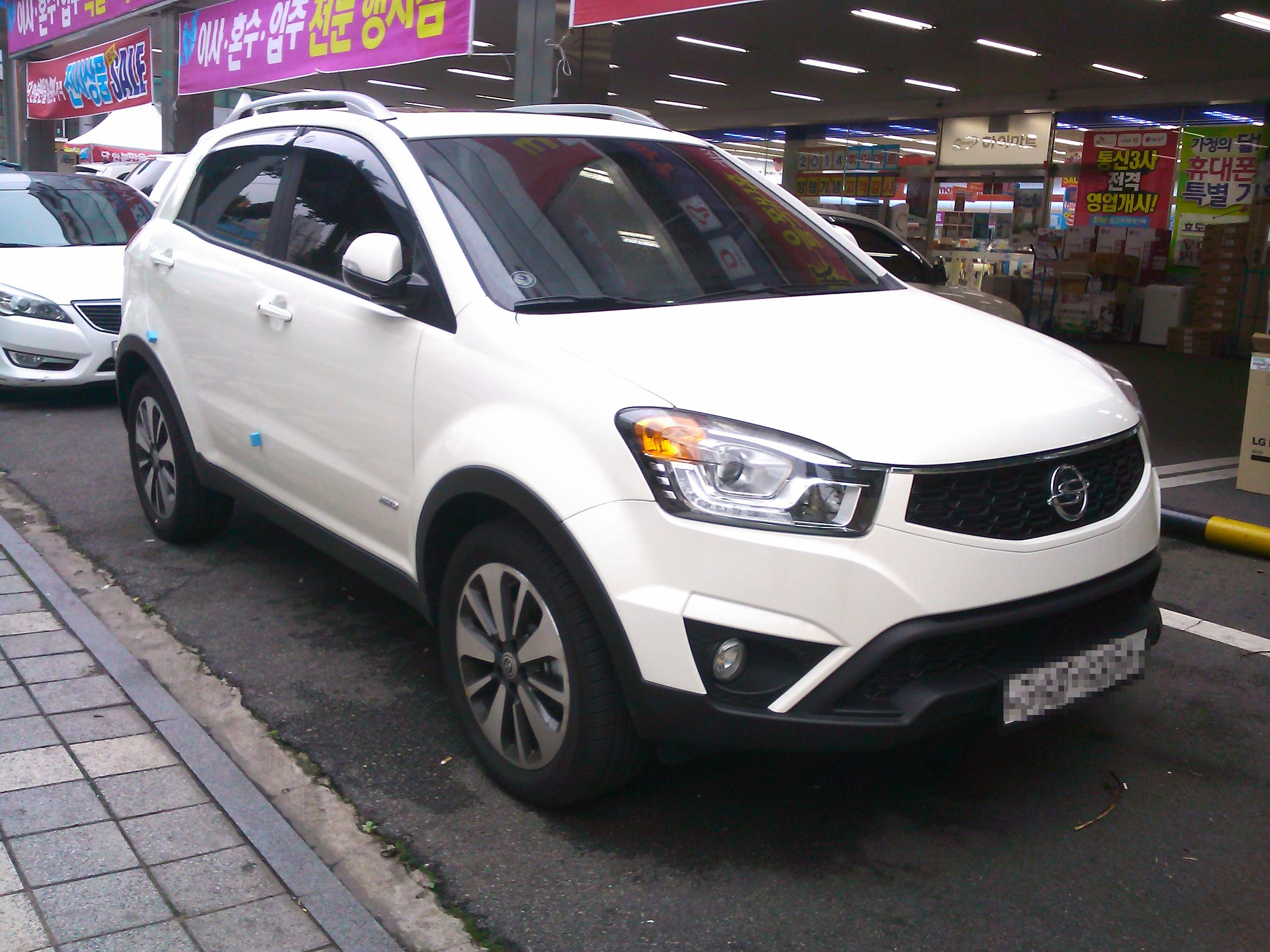 サンヨン・コランド